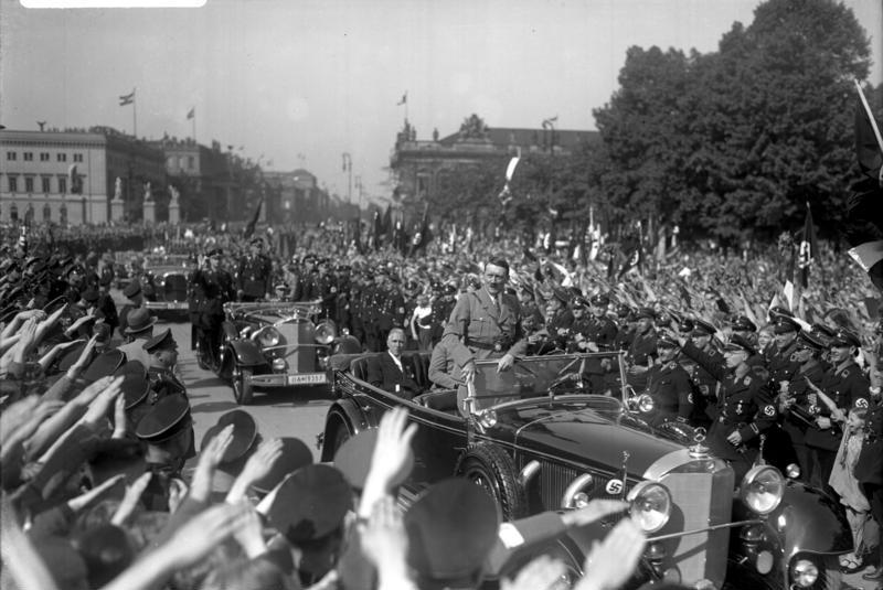 Der Feiertag der nationalen Arbeit der 1. Mai im Lustgarten in Berlin! Der Führer Reichskanzler Adolf Hitler, trifft von riesigem Jubel empfangen auf der Maikundgebung der Jugend im Lustgarten in Berlin ein. Im Wagen sitzend, Vizekanzler von Papen.